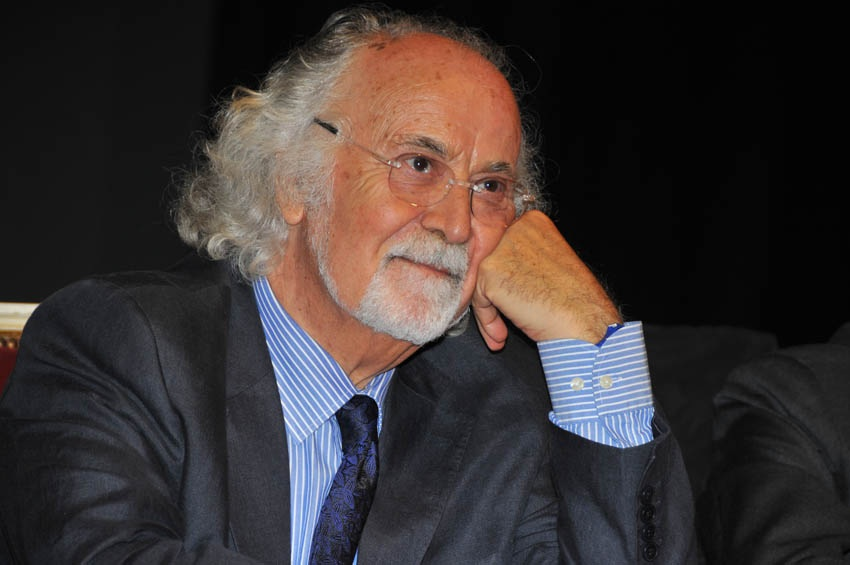 Ritratto x biografia